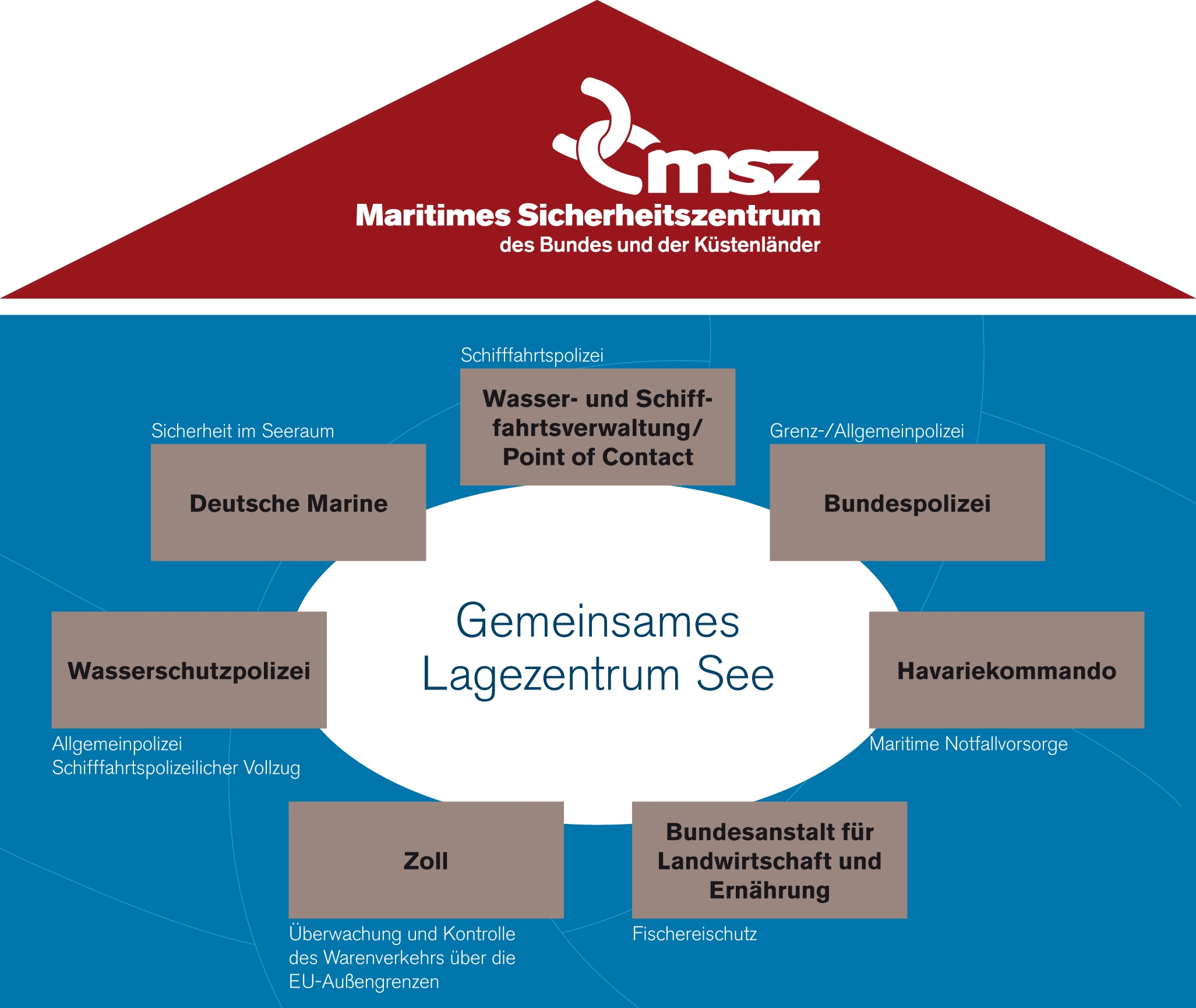 Das Gemeinsame Lagezentrum See ist der operative Kern des MSZ. Hier arbeiten die Wachhabenden der Einsatzstellen im 24-Stunden Schichtdienst.